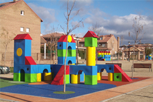 mobiliario urbano gitma parques infantiles